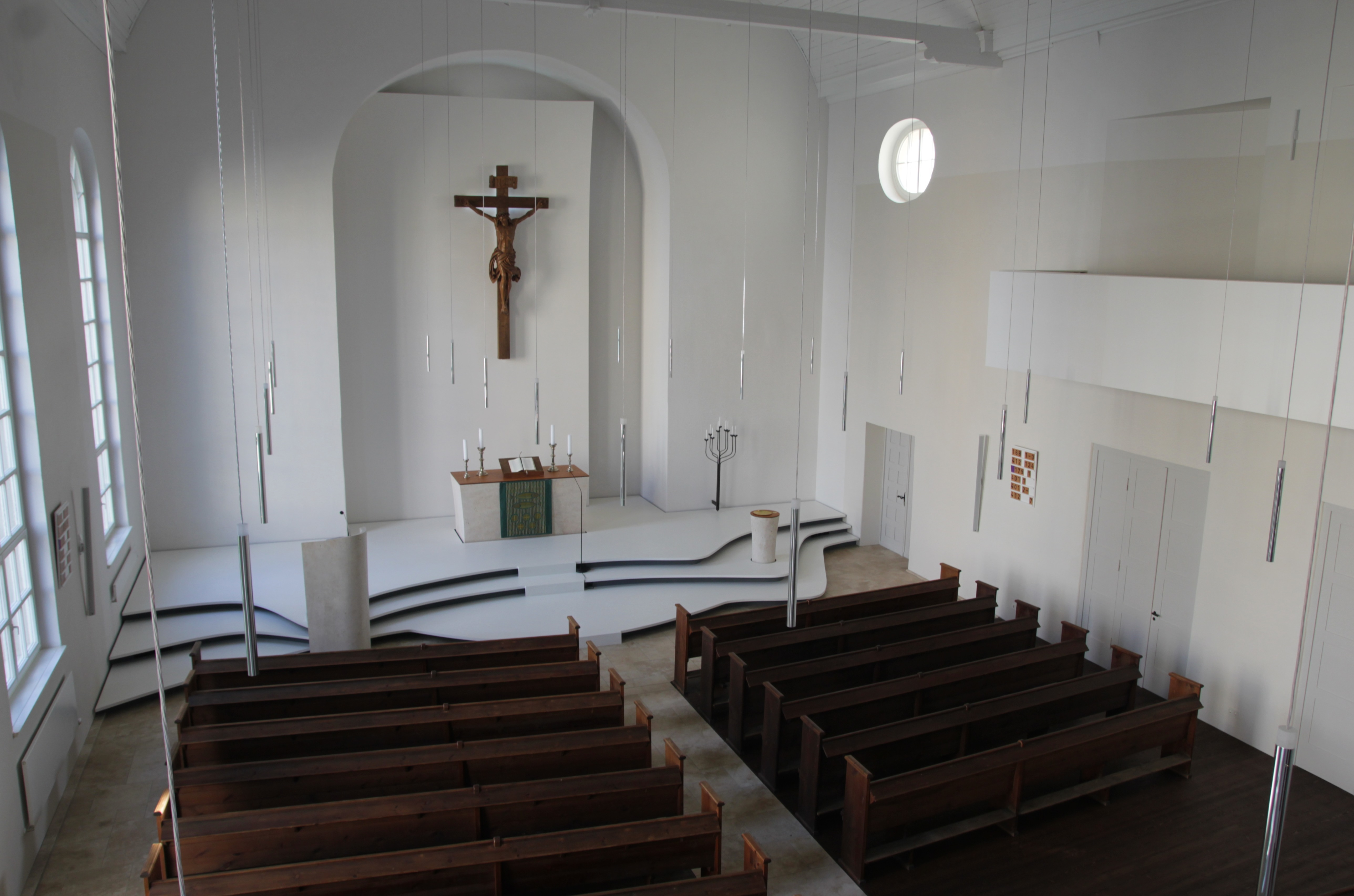 Lutherkirche in Cottbus nach der Innensanierung 2018/2019